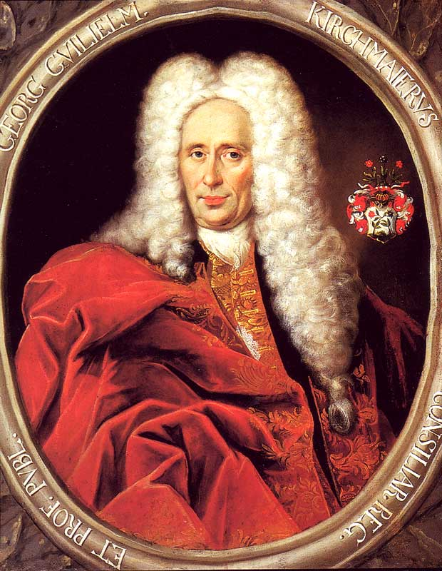 Georg Wilhelm Kirchmaier nach einem Gemälde von Michael Adolf Siebenhaar im evangelischen Predigerseminar Wittenberg